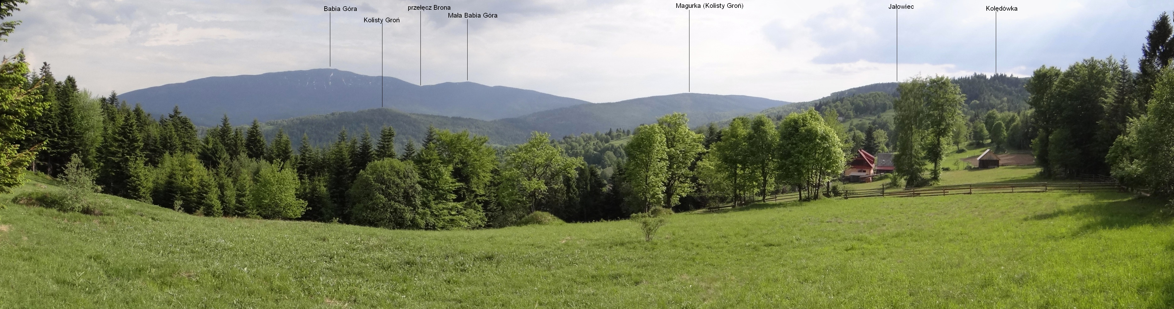 Kolędówki i panorama widokowa z Kolędówek